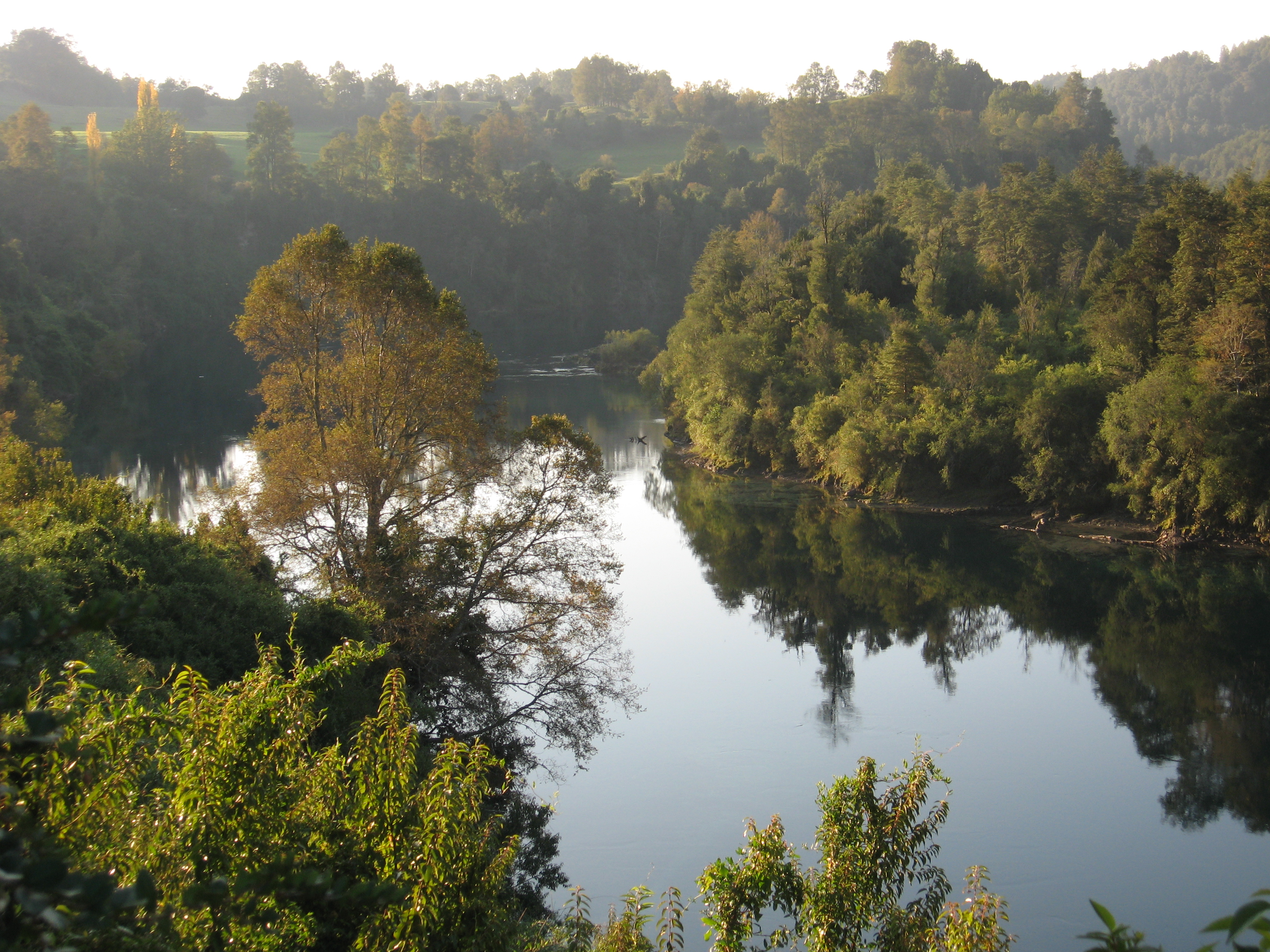 rio san pedro chile